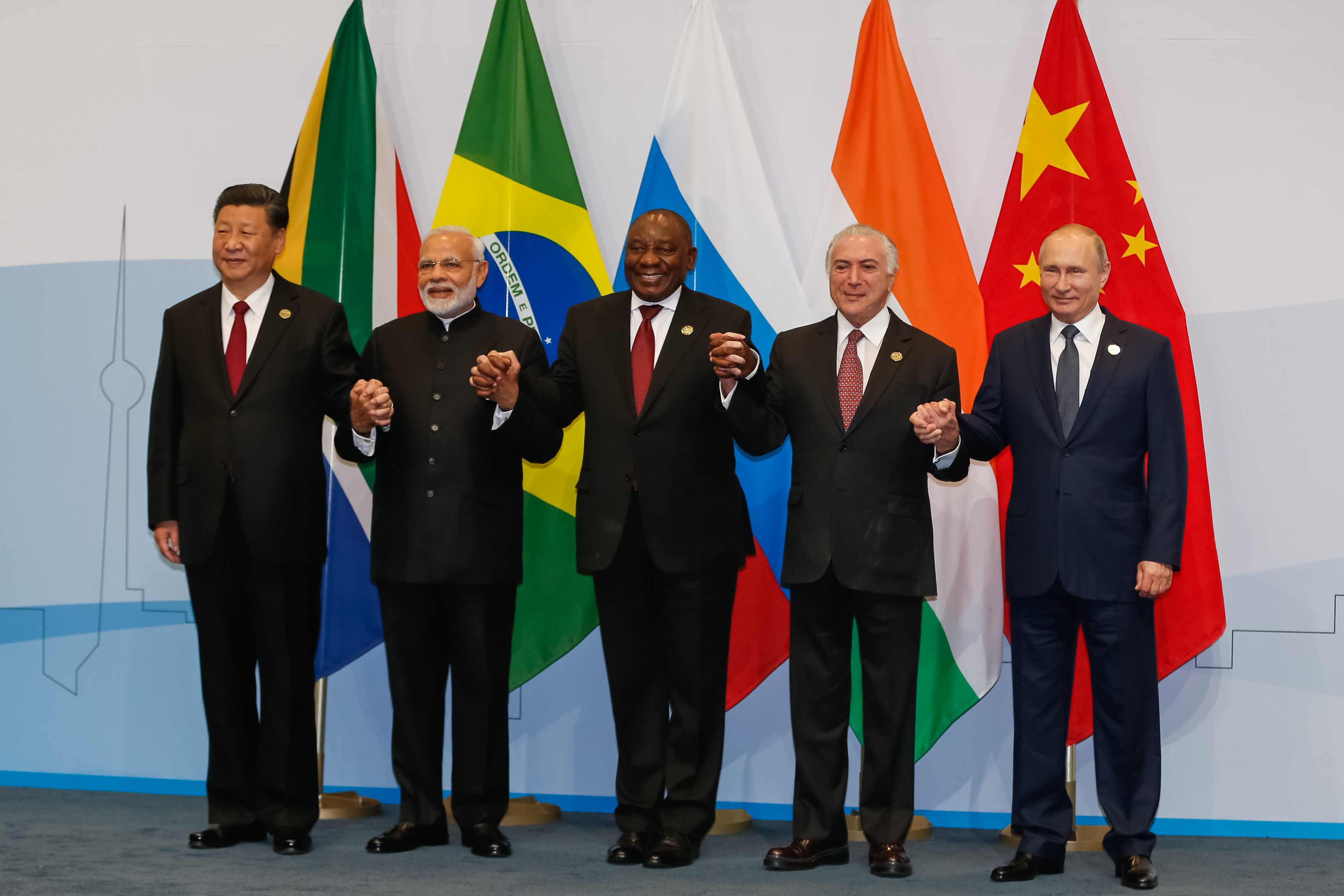 (Joanesburgo - África do Sul, 26/07/18) Presidente da República, Michel Temer posa para foto de família dos Chefes de Estado e Governo do BRICS.Foto: Cesar Itiberê/PR